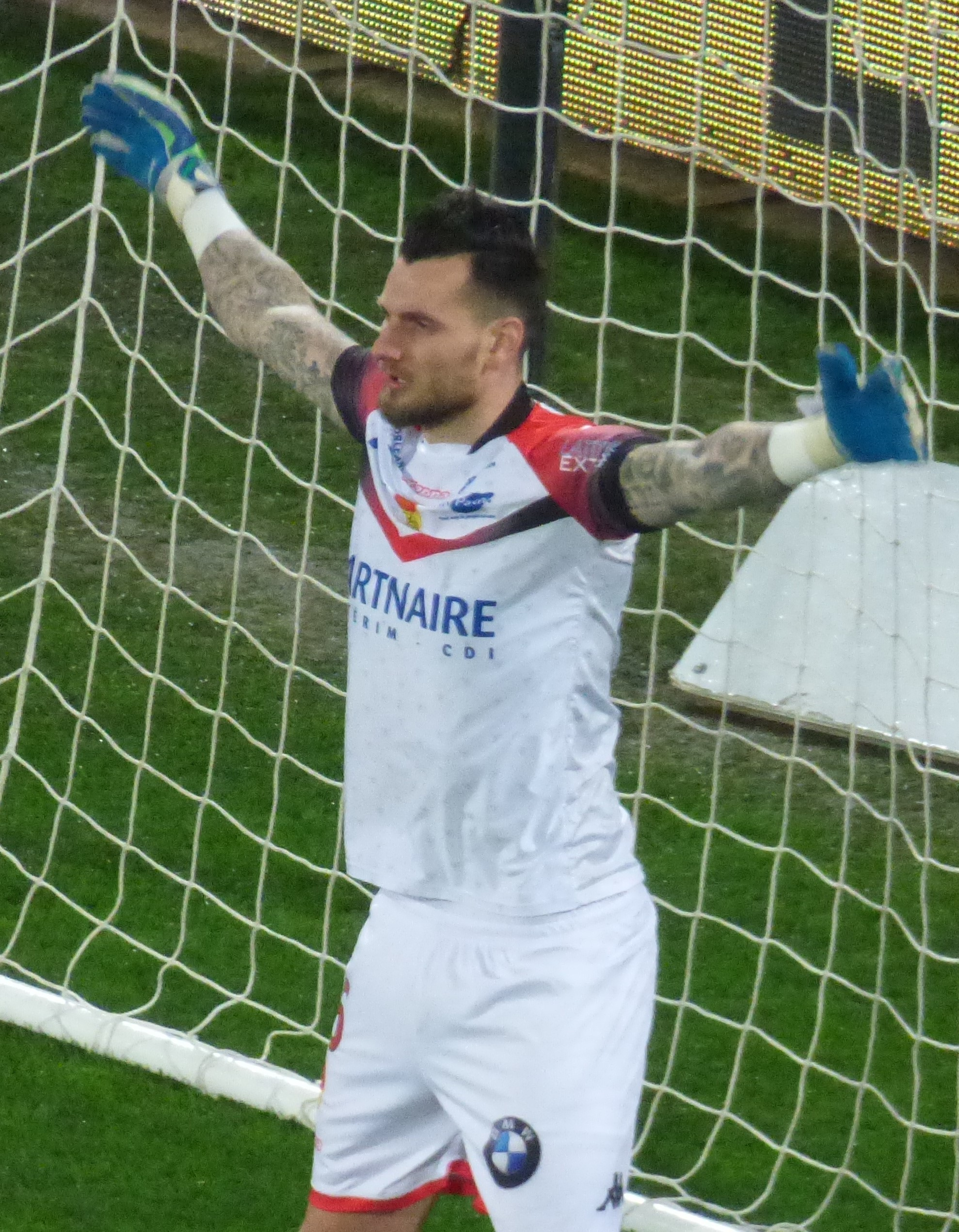 Alexandre Letellier lors du match RC Lens / US Orléans, comptant pour la vingt-huitième journée du championnat de France de football de Ligue 2 2019/2020, le 9 mars 2020.